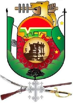 Escudo de Iguala de la Independencia, Guerrero